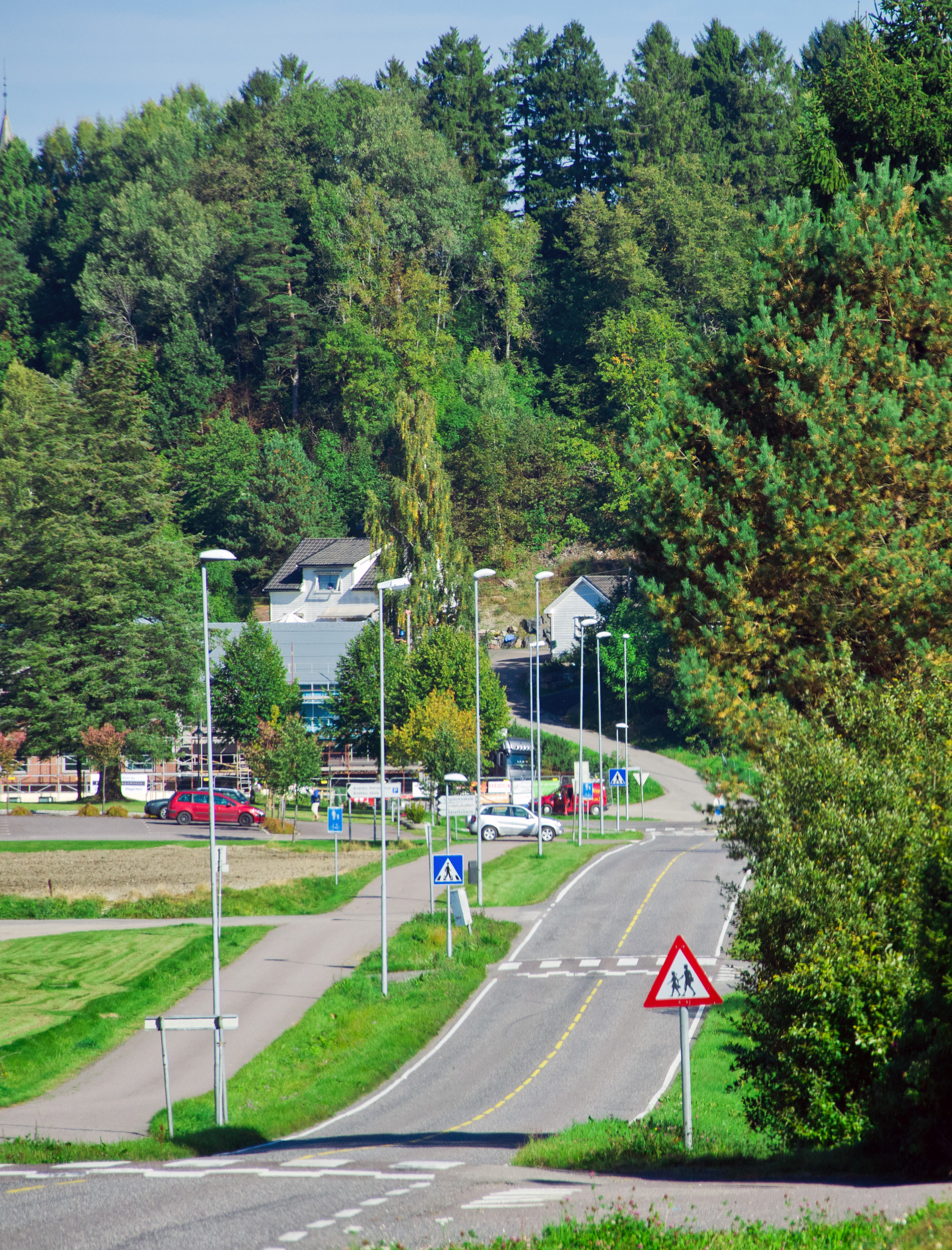 Fylkesvei 305 Kodalveien i Andebu sentrum